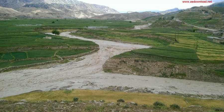 روستای دره بنیاب - طایفه محمدموسایی